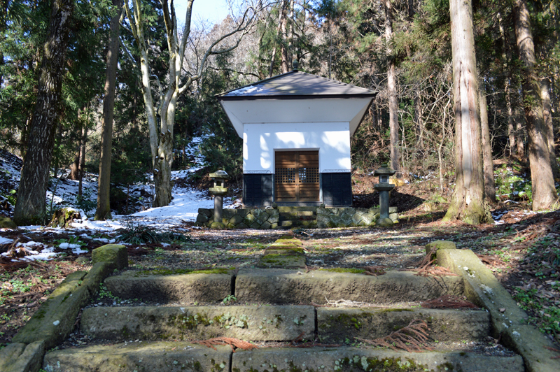 奥の院石が石段の上にあります